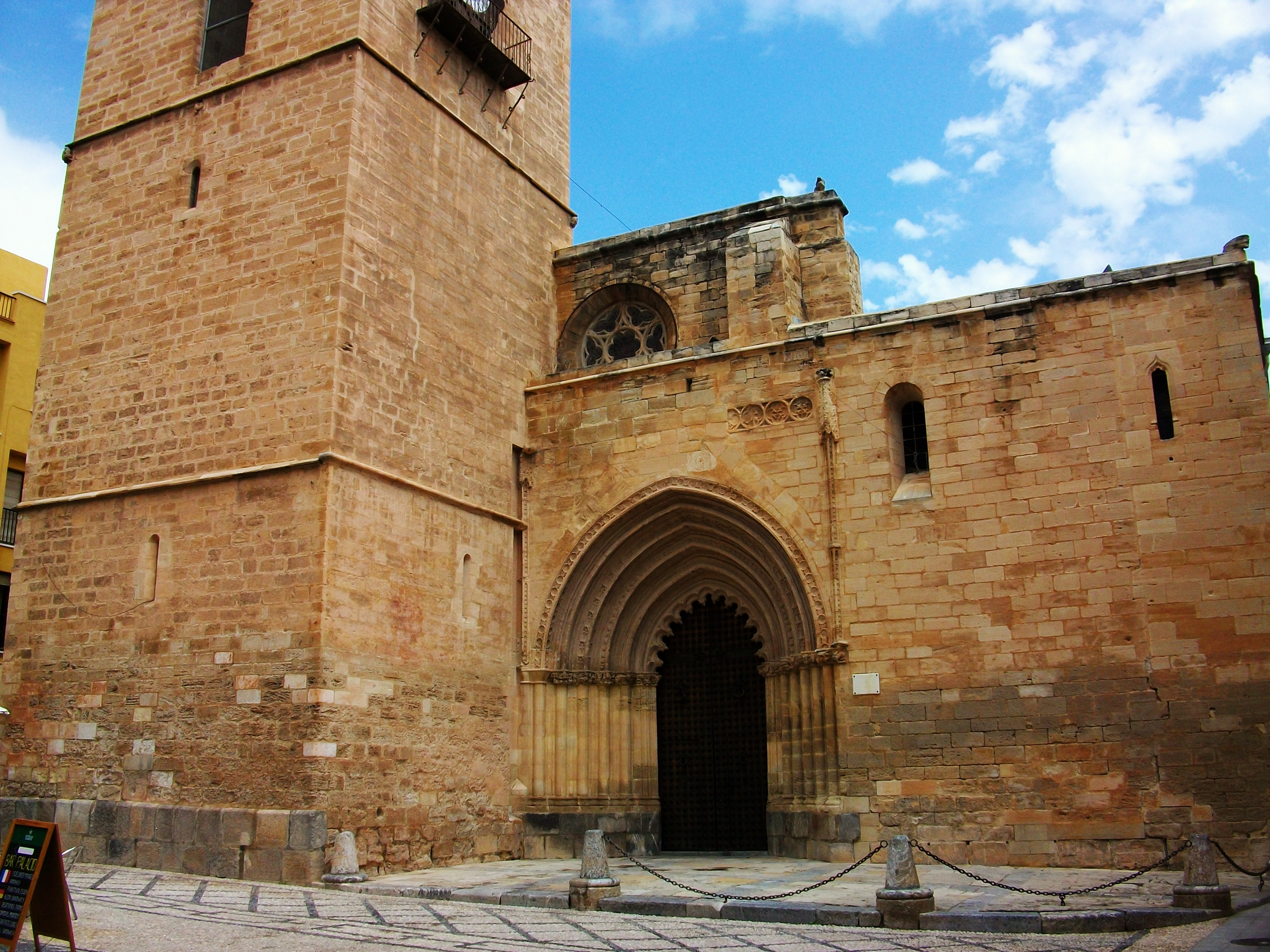 Catedral d'Oriola, Porta de les Cadenes.